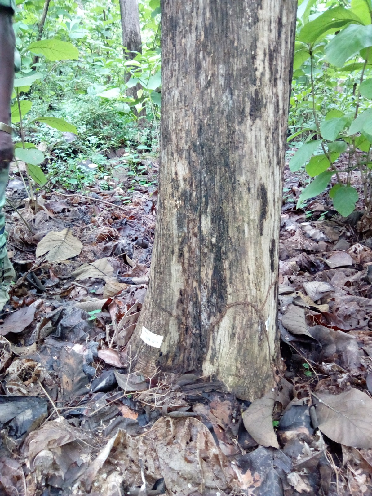 Teck marqué pendant un inventaire d'exploitation. Ce code-barre permet de tracer toutes les opérations sur cette arbre et ses futures grumes.